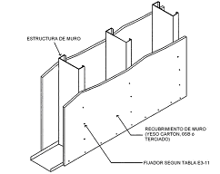 Arriostramiento de Montante con Recubrimiento